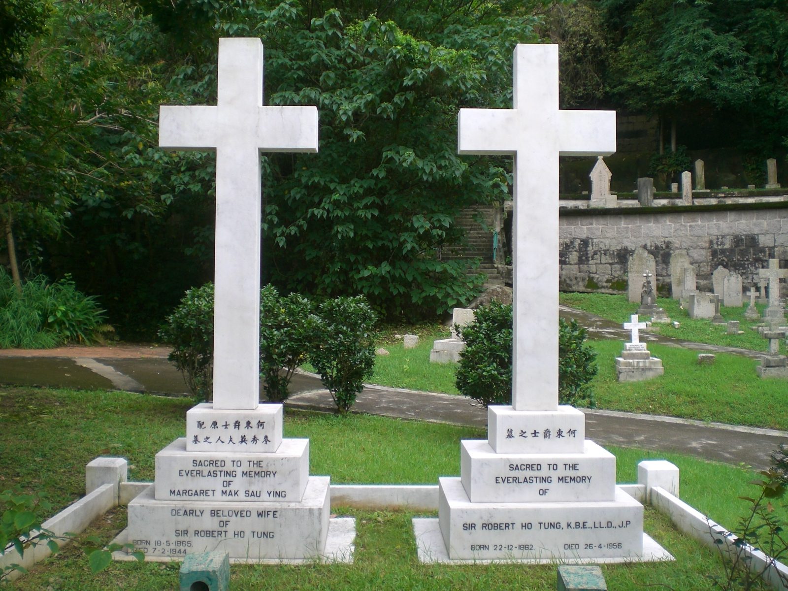 中文（香港）: 跑馬地香港墳場, 何啟東, Sir Robert HO Tung